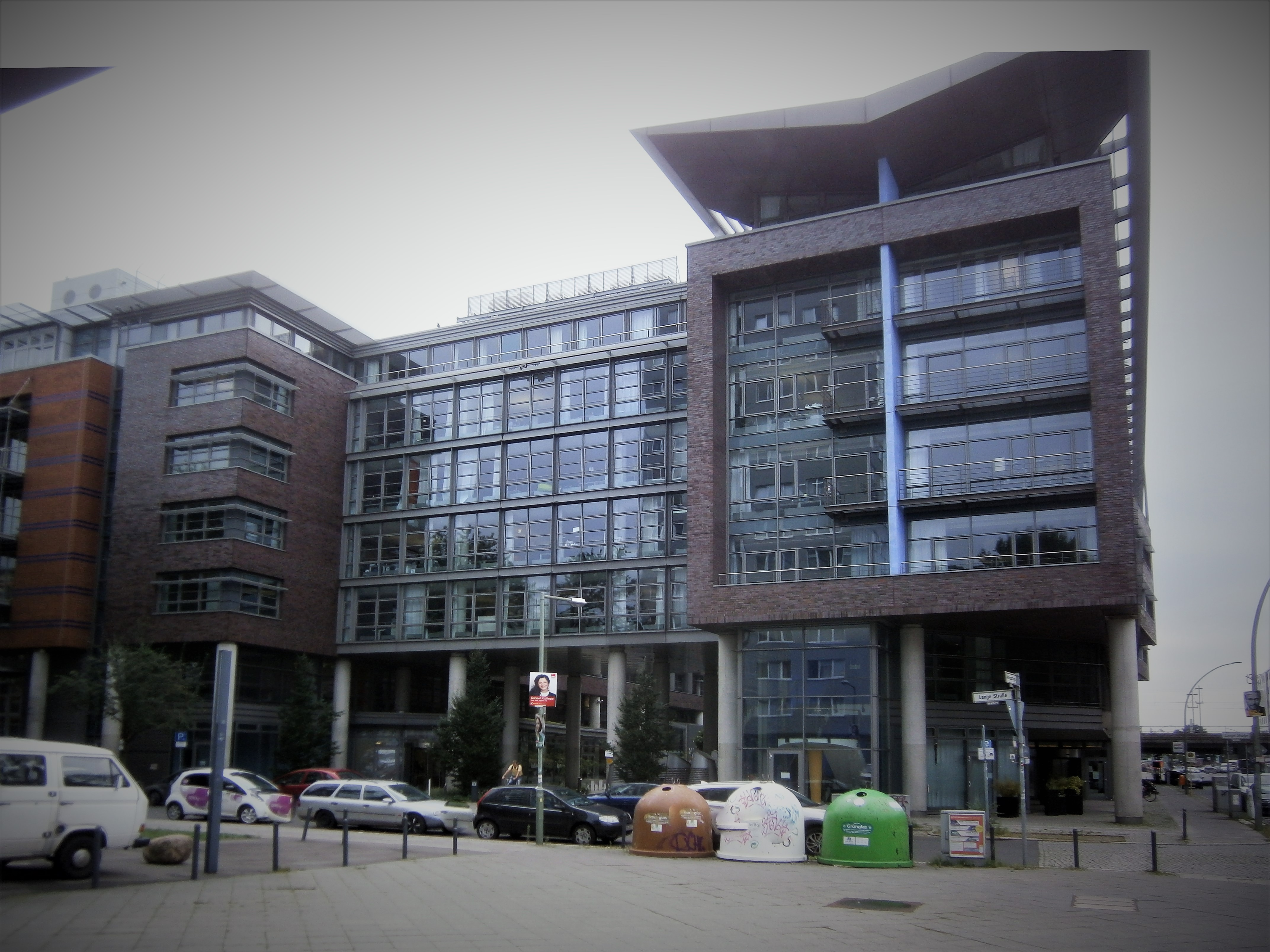 Die Andreasstraße ist eine Straße im Berliner Bezirk Friedrichshain-Kreuzberg, Ortsteil Friedrichshain. Angelegt wurde sie 1862 auf vorherigen Gartenland und 1863 benannt. Bis um 1900 waren die Grundstücke bebaut und bis 1930 wurde verdichtet. Bei Luftangriffen im Zweiten Weltkrieg wurde die Gebäude schwer getroffen. So ist die Straße seit den 1950er Jahren mit wiederhergestellten Altbauten, aber besondres durch Plattenbau-Wohnblöcke aber seit 1990 auch durch Hotel- und Bürobauten im Umfeld des Ostbahnhofs charakterieisiert. Das Bild zeigt den Bürokomplex Andreasstraße 10/ Lange Straße 30